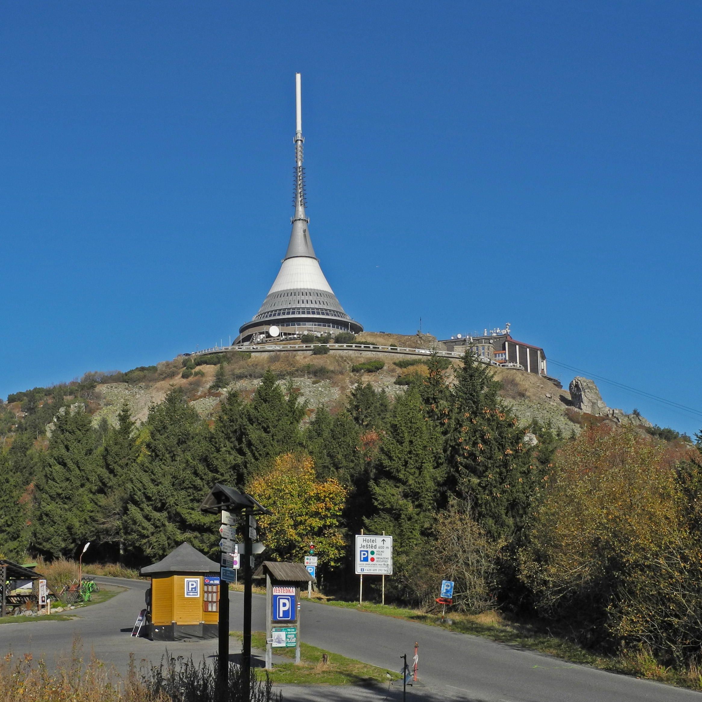 Blick vom Jeschken-Sattel (Ještědka) am östlichen Jeschken-Kammweg zum Jeschken (Ještěd)